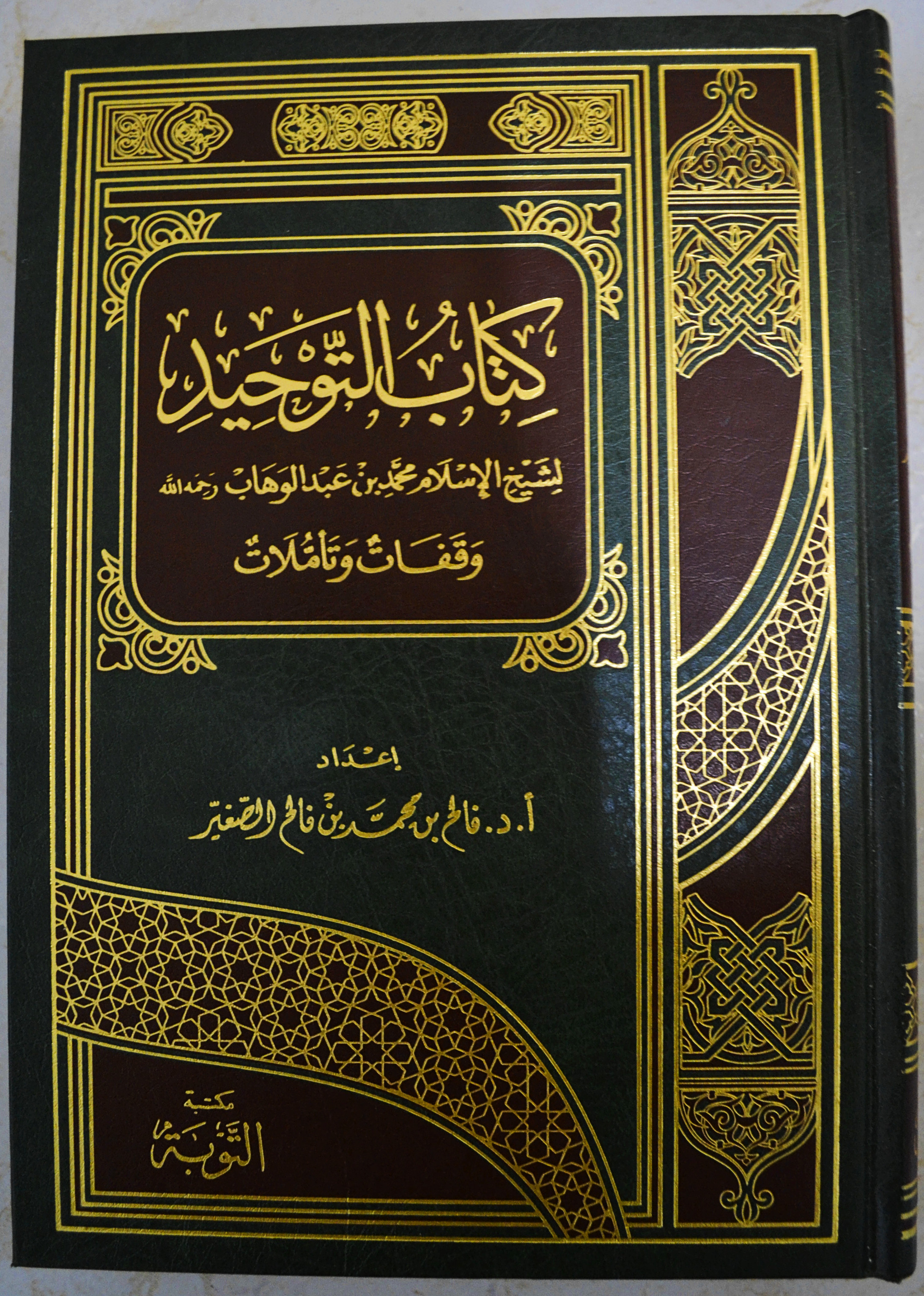 Kitab ini ditulis oleh Muhammad bin Abdul Wahhab